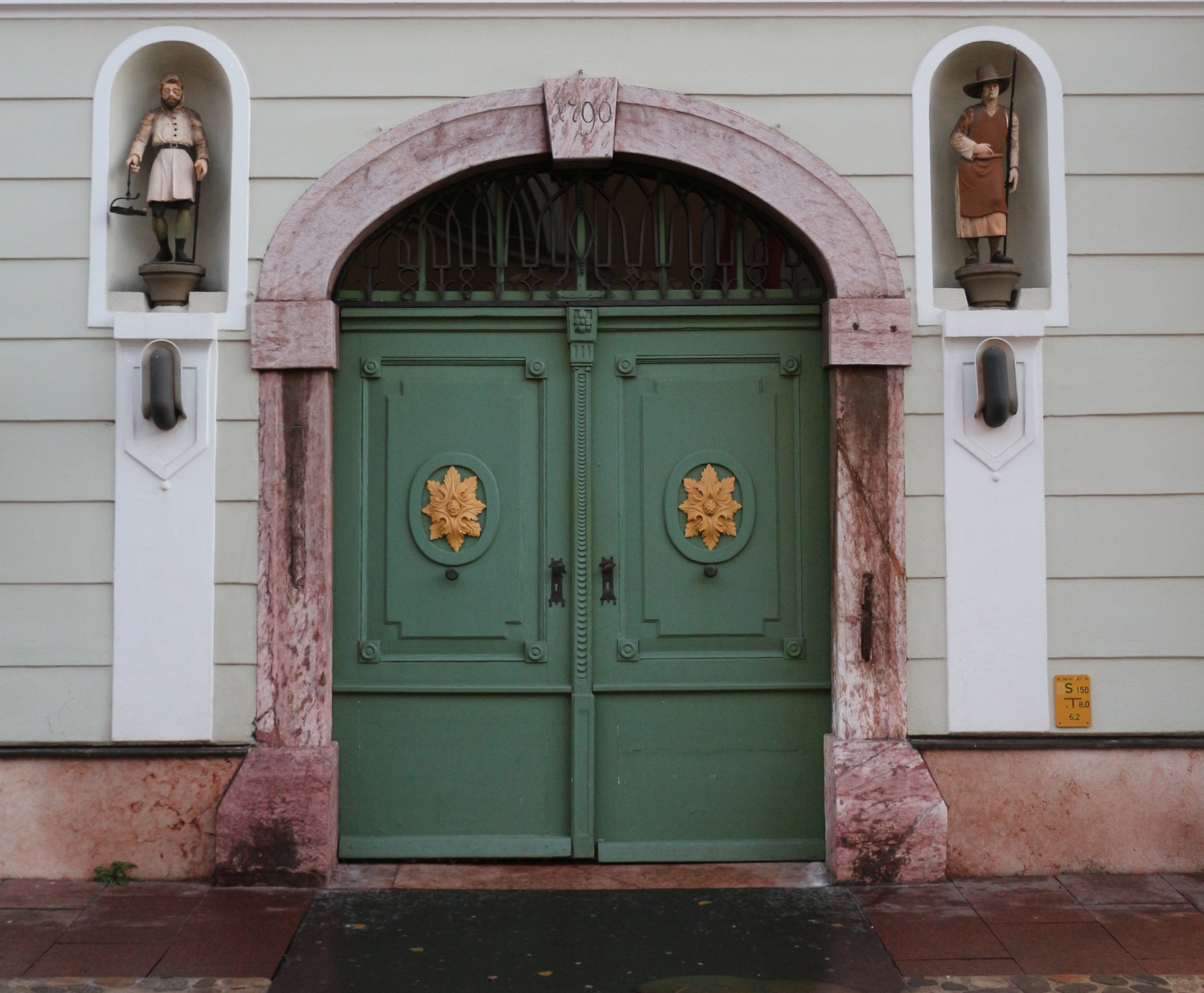 In der steirischen Stadt Leoben